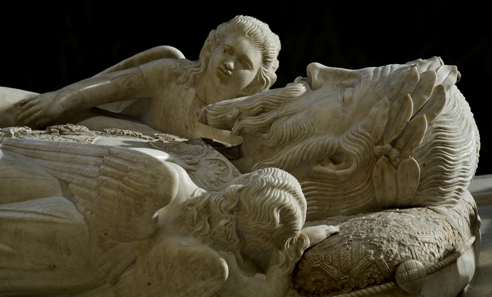 unidentified Spain